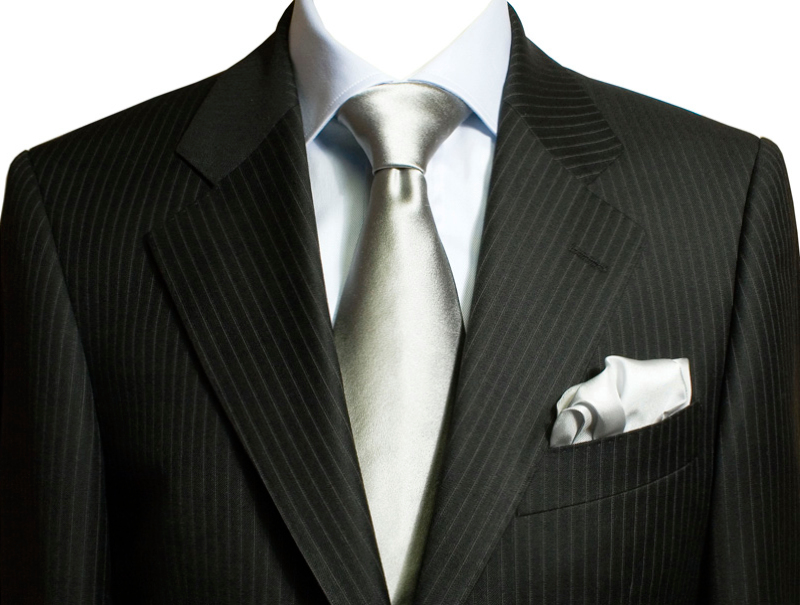 Pinstripe dress.